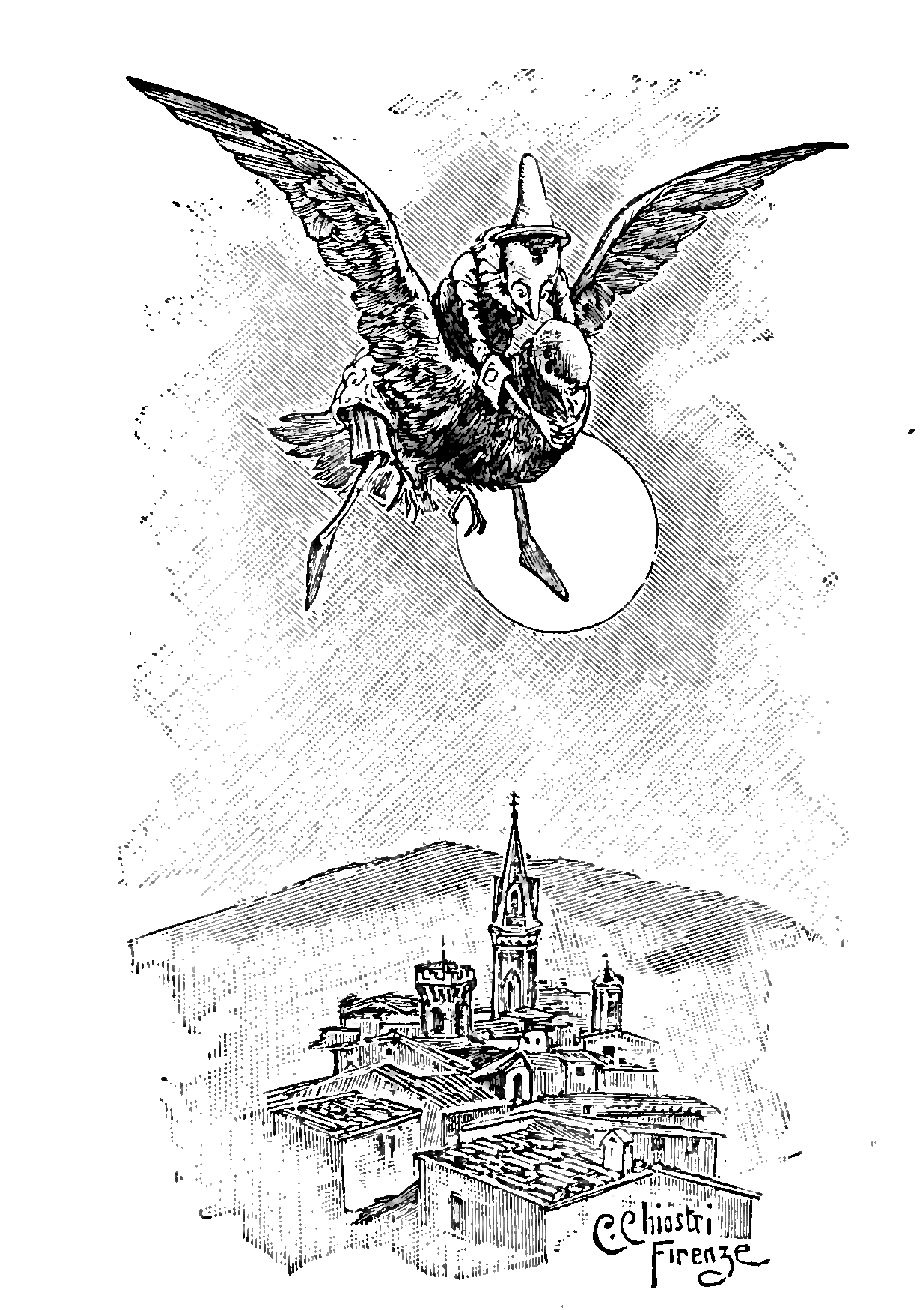 Illustrations from "Le avventure di Pinocchio, storia di un burattino", Carlo Collodi, Bemporad & figlio, Firenze 1902 (Drawings and engravings by Carlo Chiostri, and A. Bongini)